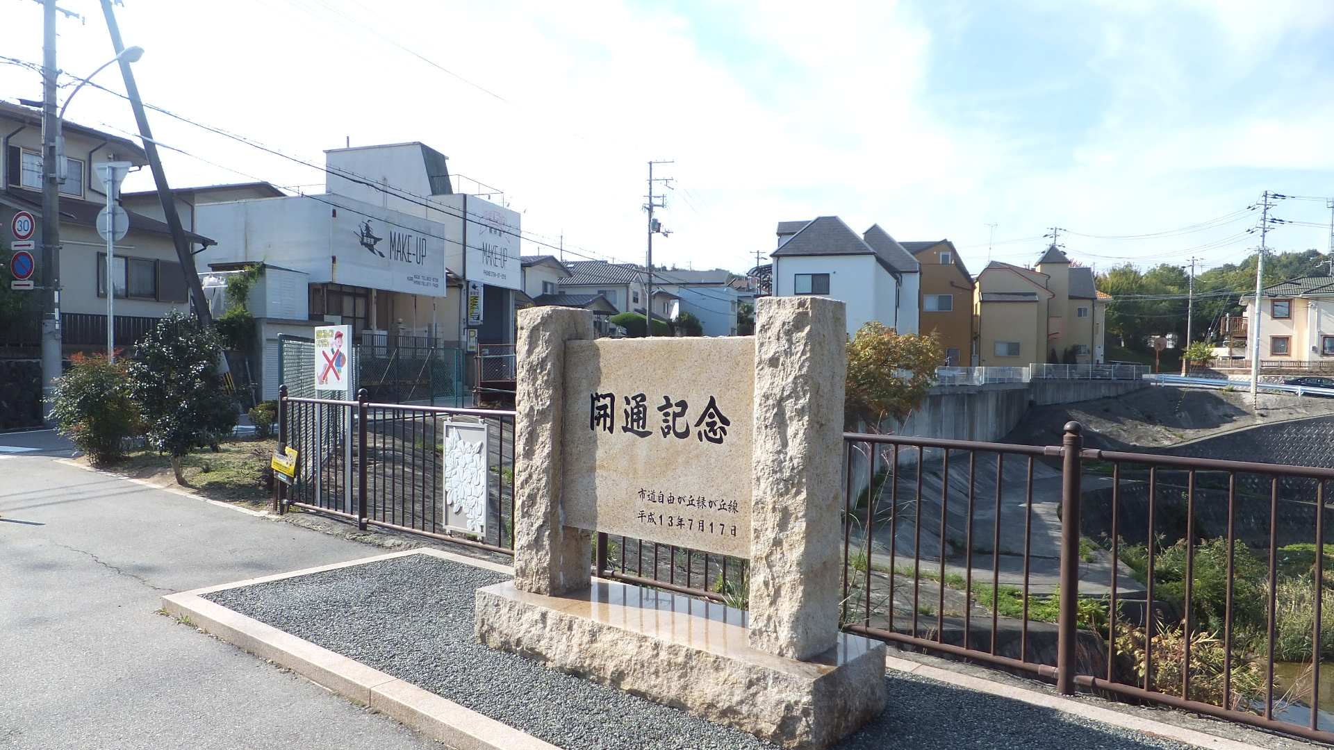 三木市道自由が丘緑が丘線 開通記念脾